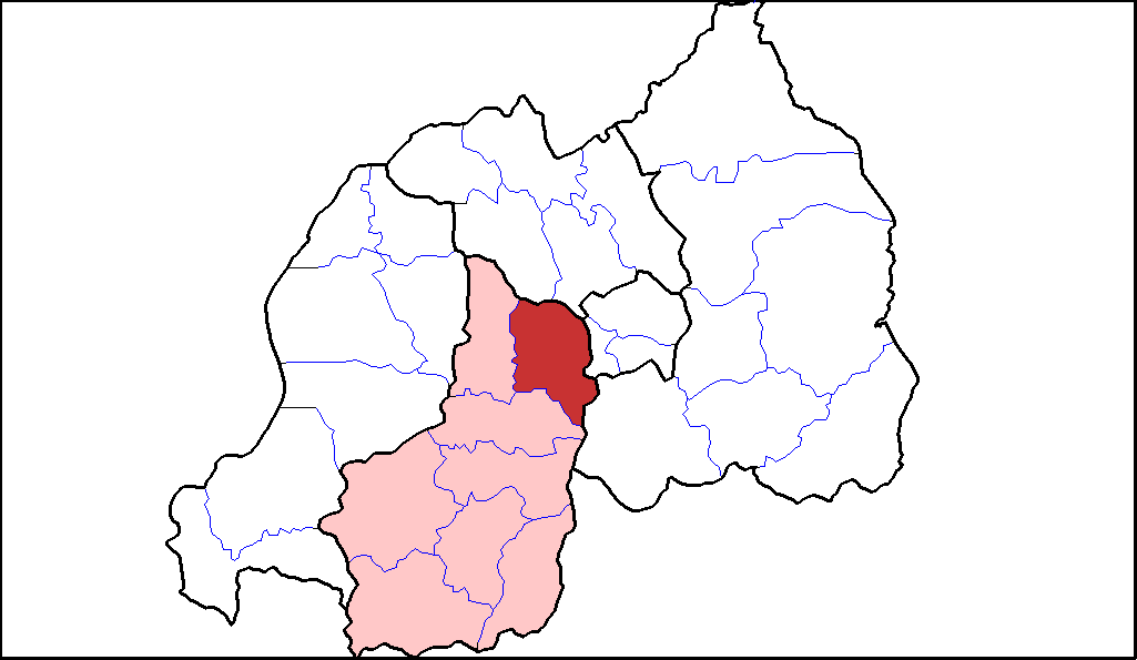 Distretto di Kamonyi.